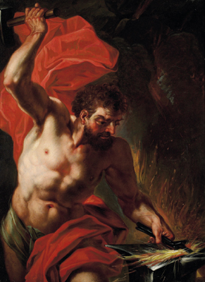 Vulcanlabel QS:Lde,"Vulkan"label QS:Len,"Vulcan"label QS:Les,"Volcano"